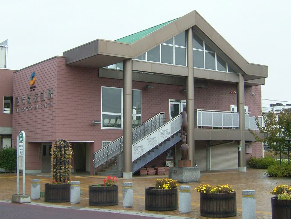 しなの鉄道屋代高校前駅、投稿者（パリカール）が2007年11月11日に撮影した画像を、12月12日に調整し再アップ